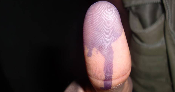 Un électeur avec l' encre indélébile au pouce, après son vote dans un centre dans la commune de la Tshopo à Kisangani